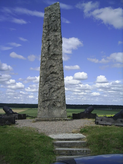 Torstensonmonumentet i närheten av Lennart Torstensons Forstena gård i Västra Tunhem, Vänersborgs kommun. Fotograferad 8 juli 2004 av Tubaist 4 september 2004 kl.23.17 (CEST) Detta kort visar tyvärr monumentets baksida. Monumentets framsida är riktat mot ett sädesfält och står man där hamnar man dessutom mycket lägre. Detalj av framsidan se: Torstensonmonumentet detalj.jpg